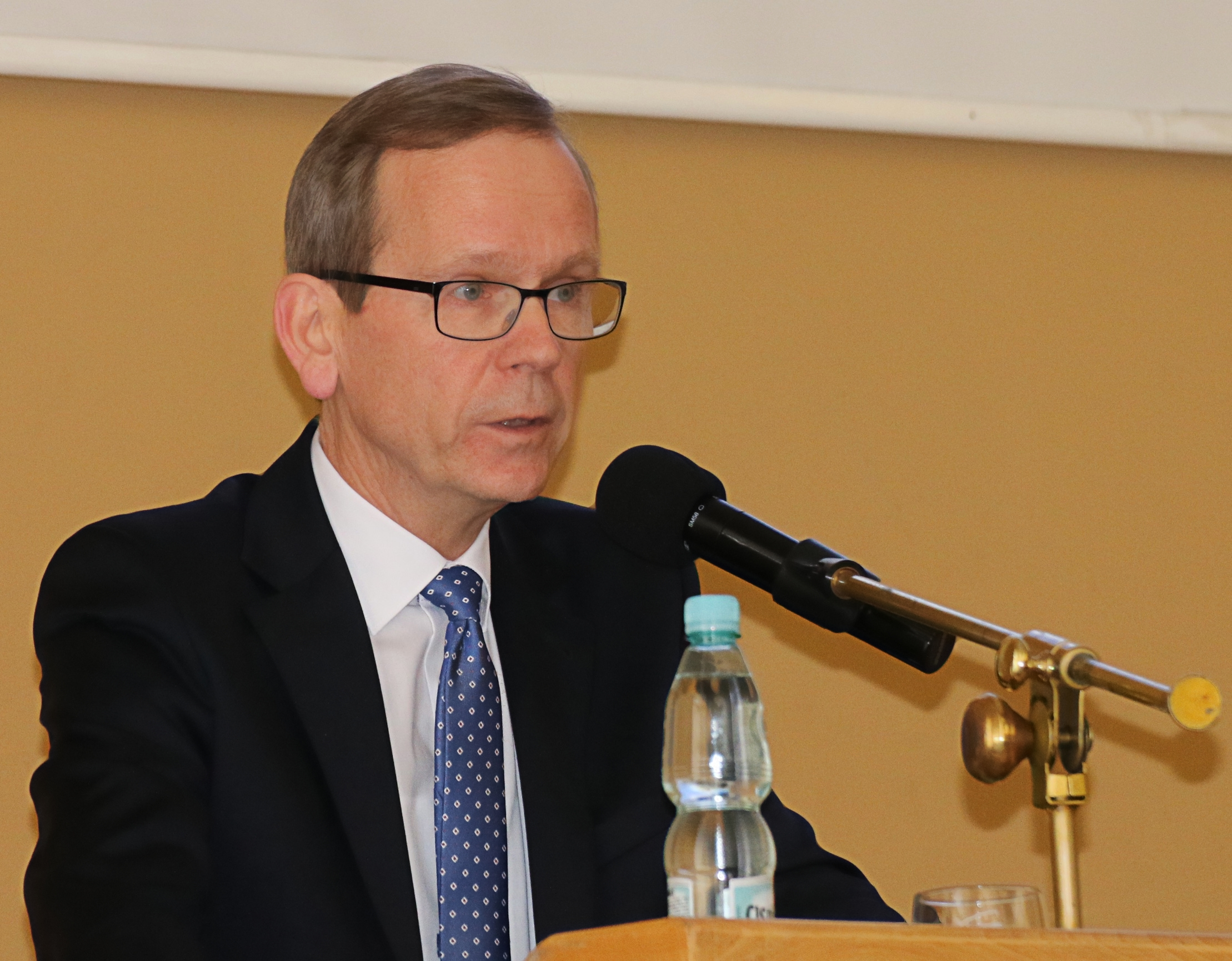 Prof. Maciej Żukowski podczas wystąpienia na International Conference on Finance and Economic Policy organizowanej przez Uniwersytet Ekonomiczny w Poznaniu